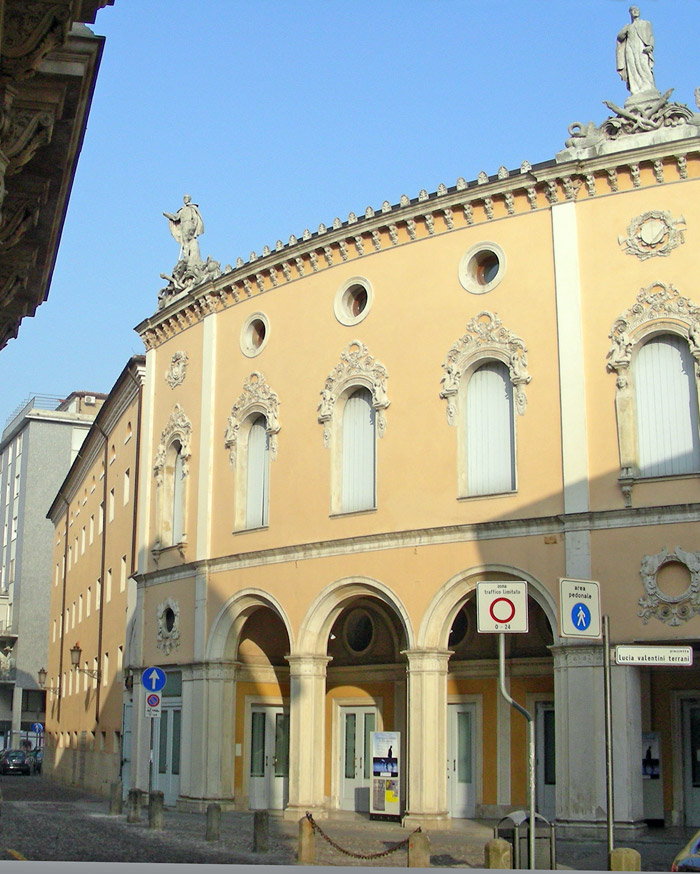 Padova, Teatro Giuseppe Verdi